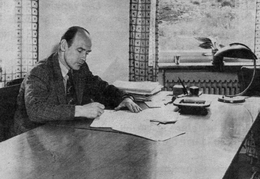 Nils Eliasson, kommunpolitiker i Huddinge